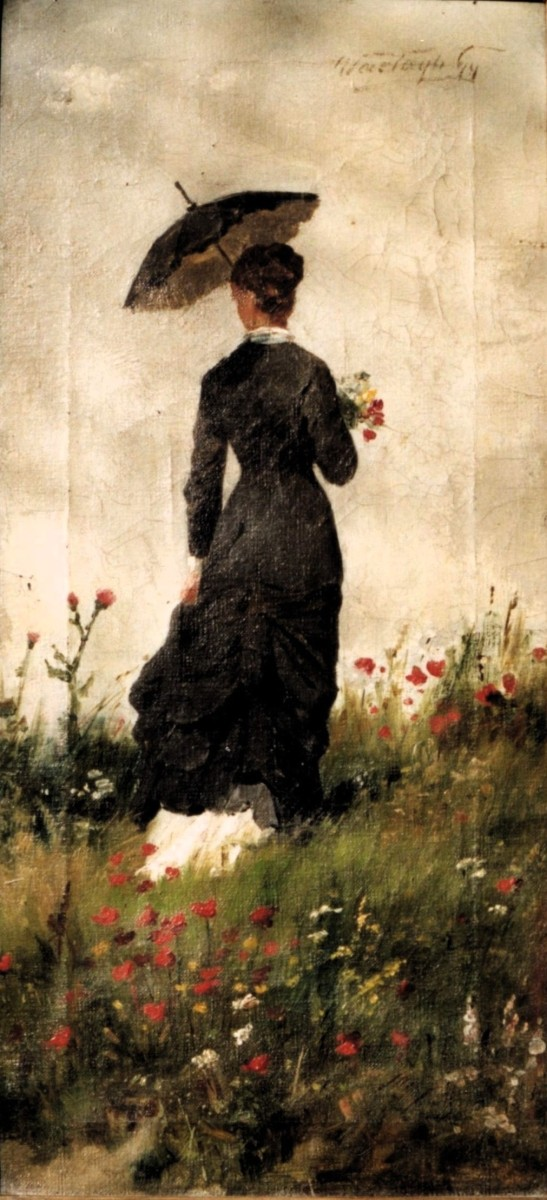 Id. Vastagh György: Nő napernyővel (Budapest)